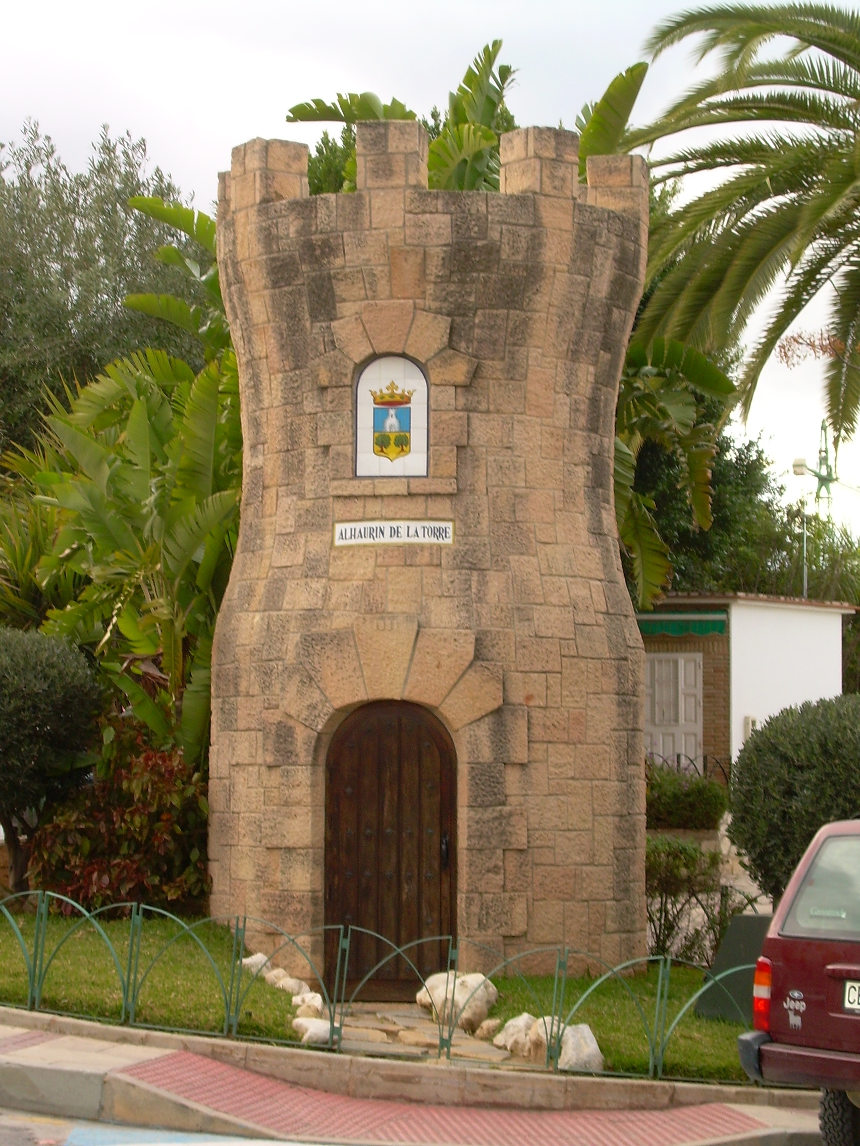 Torre símbolo de Alhaurin de la Torre, Malaga, España